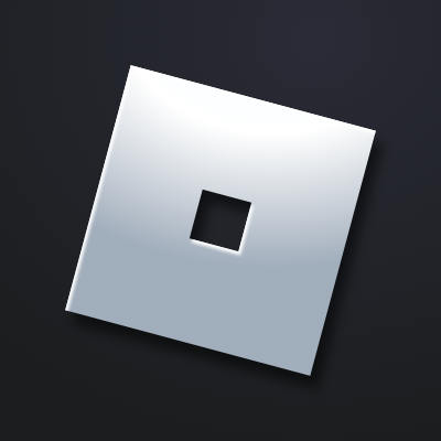 RBX2019